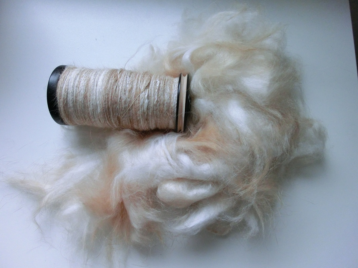 Versponnenes Garn und gepflücktes Fell eines roten Satinangoras